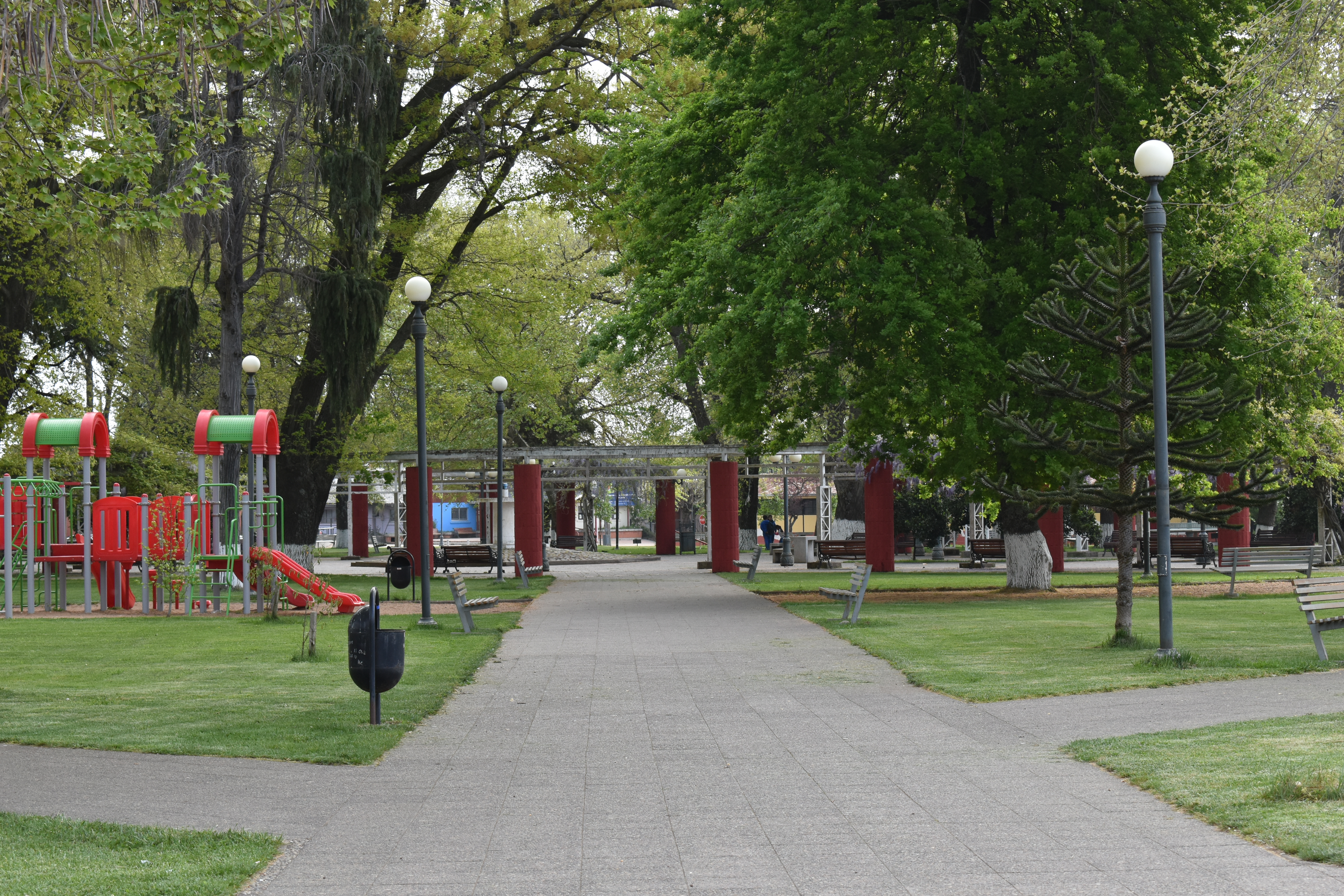 San Ignacio